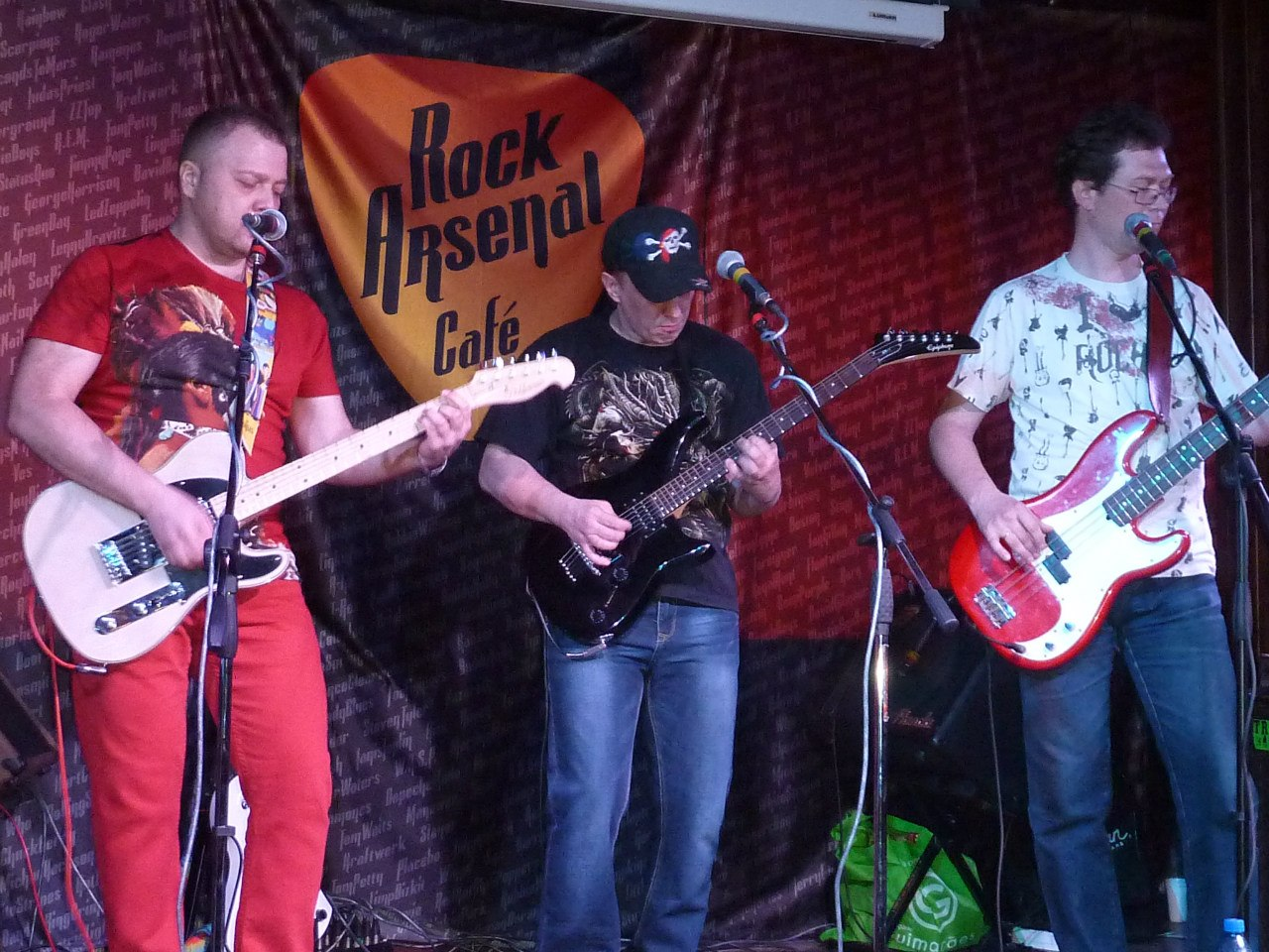 ZV in Rock-Arsenal Cafe